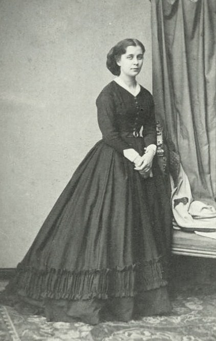 Варвара Дмитриевна Замятнина (1840—1894), в первом браке Спасская, во втором замужем за князем Дмитрием Владимировичем Друцким-Соколинским (1836—1902).